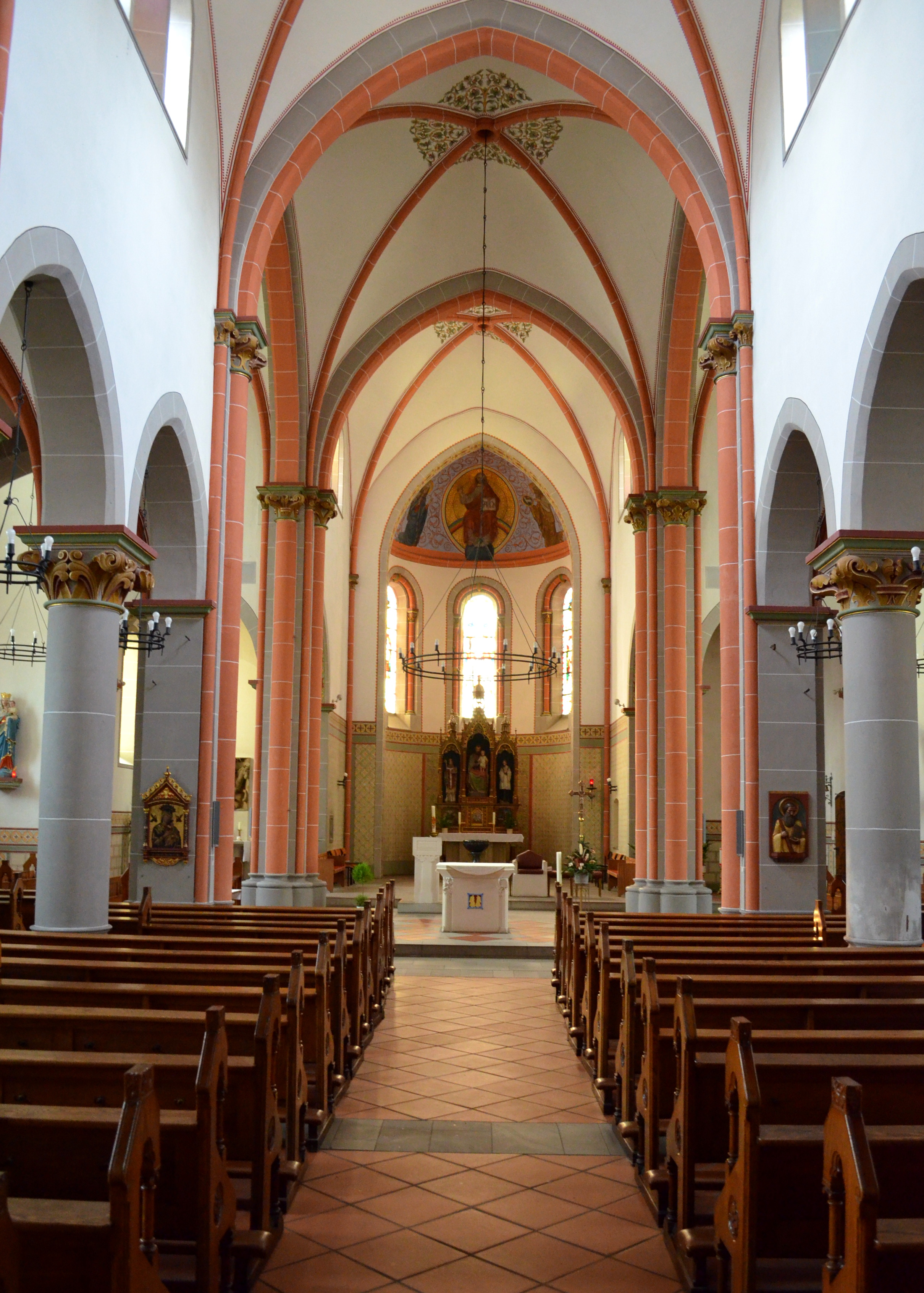 overzicht interieur